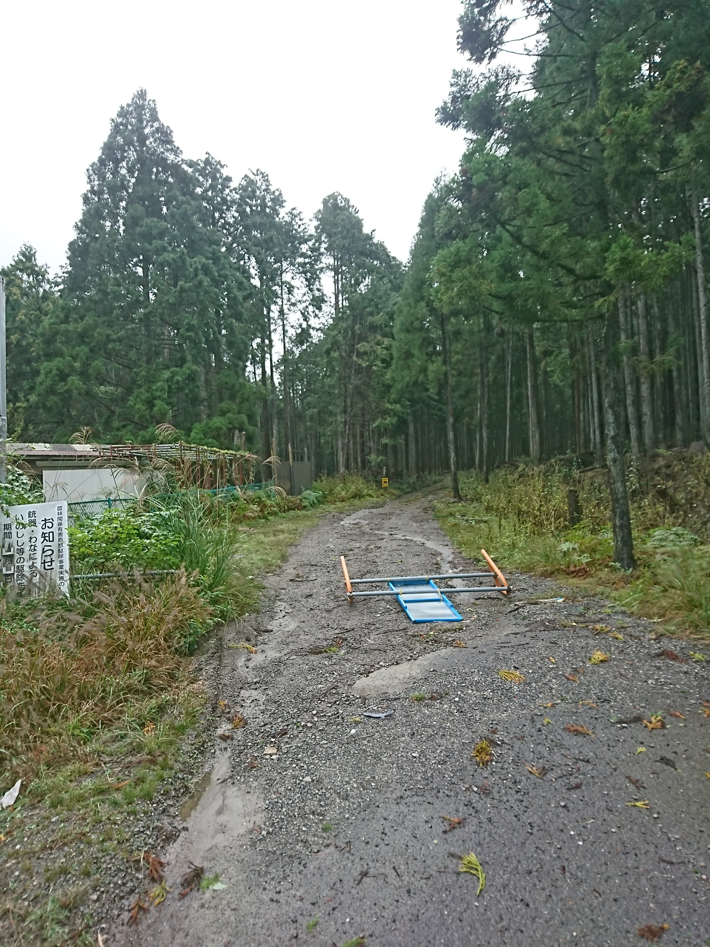 大原花背線の起点付近。この箇所は舗装されていないが、この先に舗装された箇所がある。